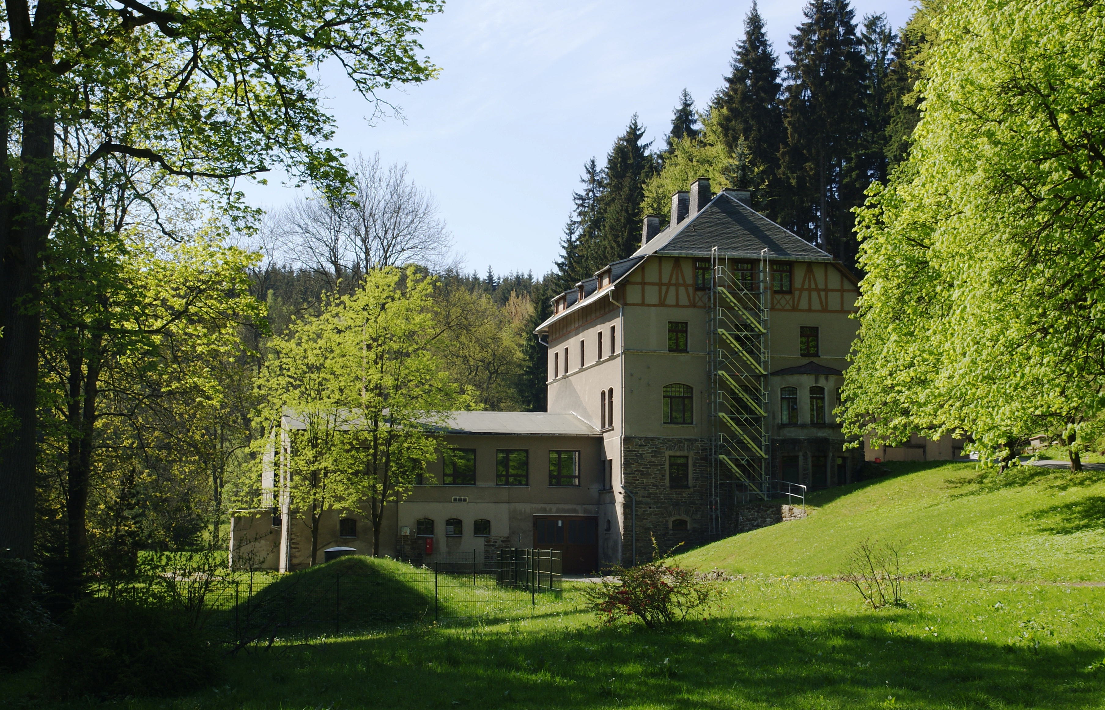 Hammermühle Neunzehnhain